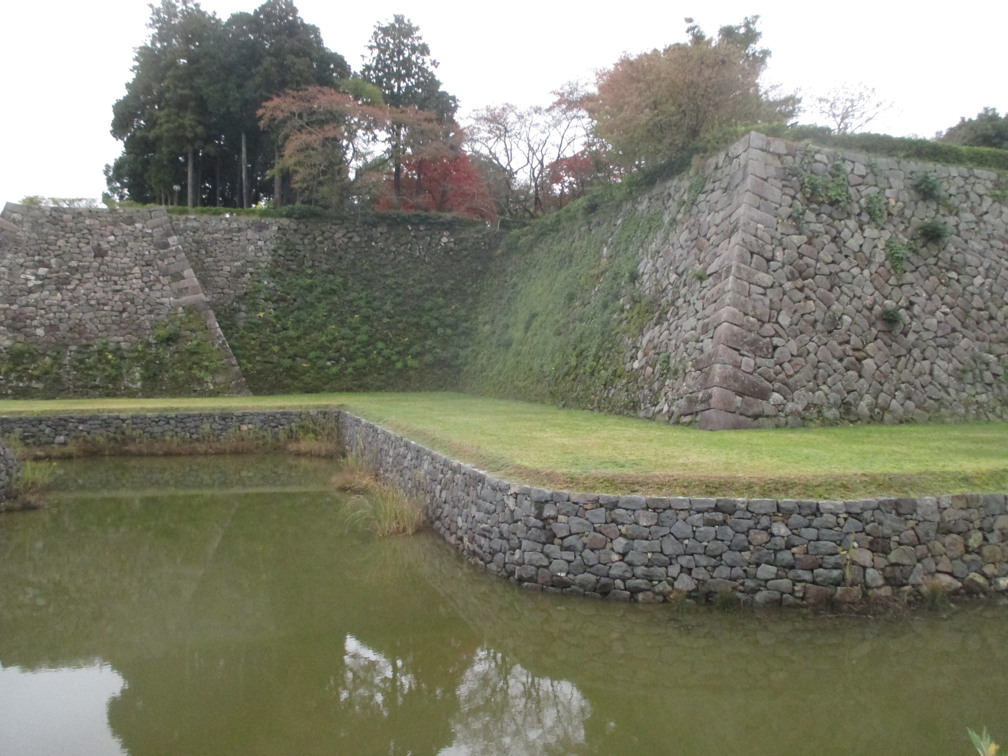 篠山城跡 Sasayama Castle Ruins